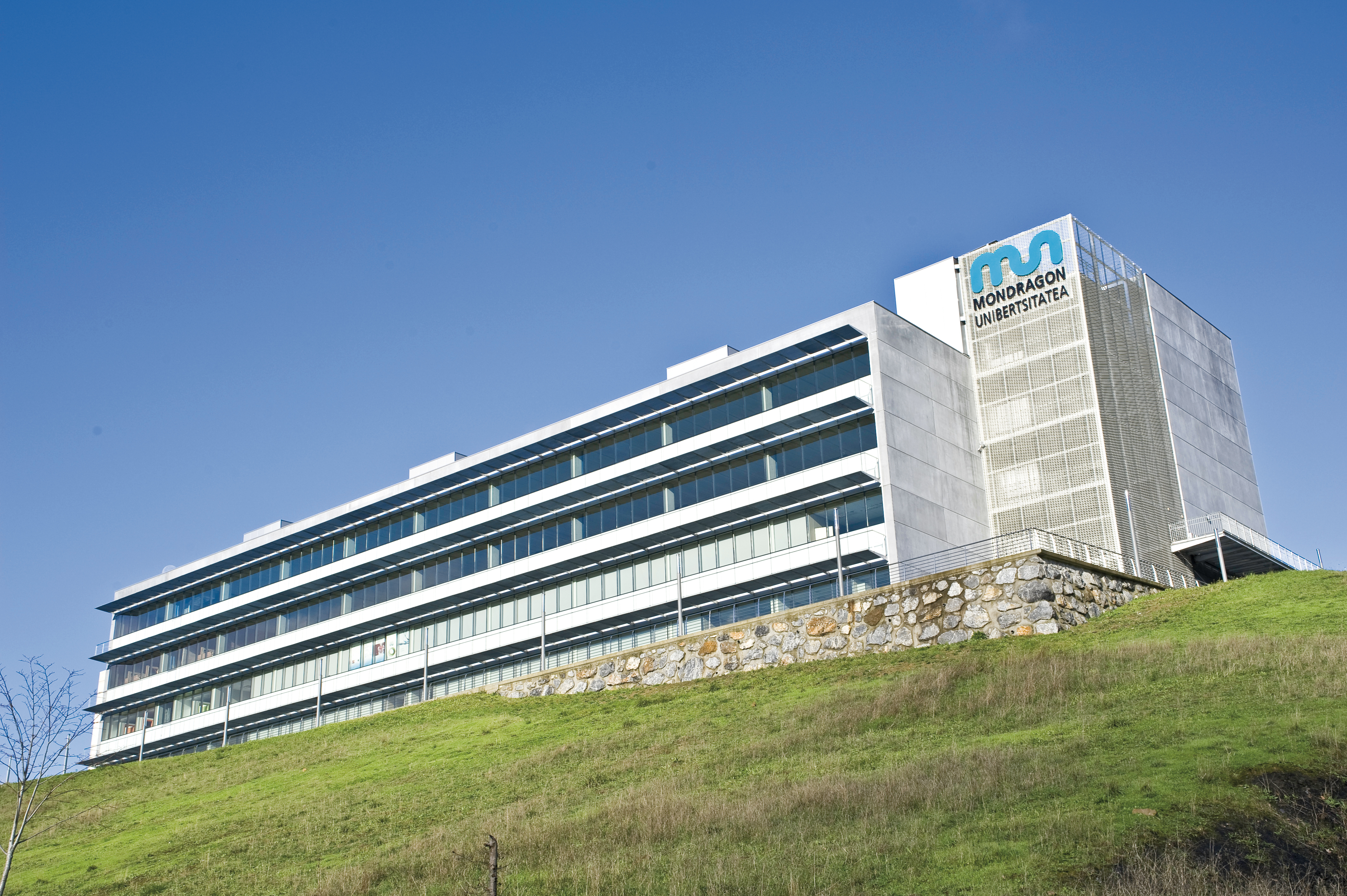 Edificio Mondragon Goi Eskola Politeknikoa en Garaia (Arrasate)